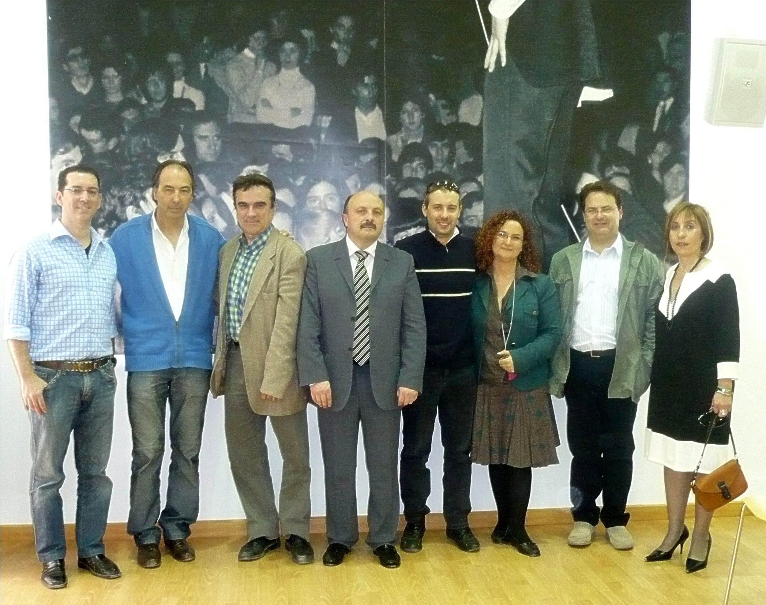 A principios de abril de 2007 se presento el primer proyecto de un gran musical sobre la figura de Nino Bravo llamado Noelia.Aqui con el alcalde de Aielo,Manu(cuñado de Nino Bravo)y creadores de la idea original.Esto fue en el museo de dicho pueblo dedicado a Luis Manuel Ferri,Nino Bravo